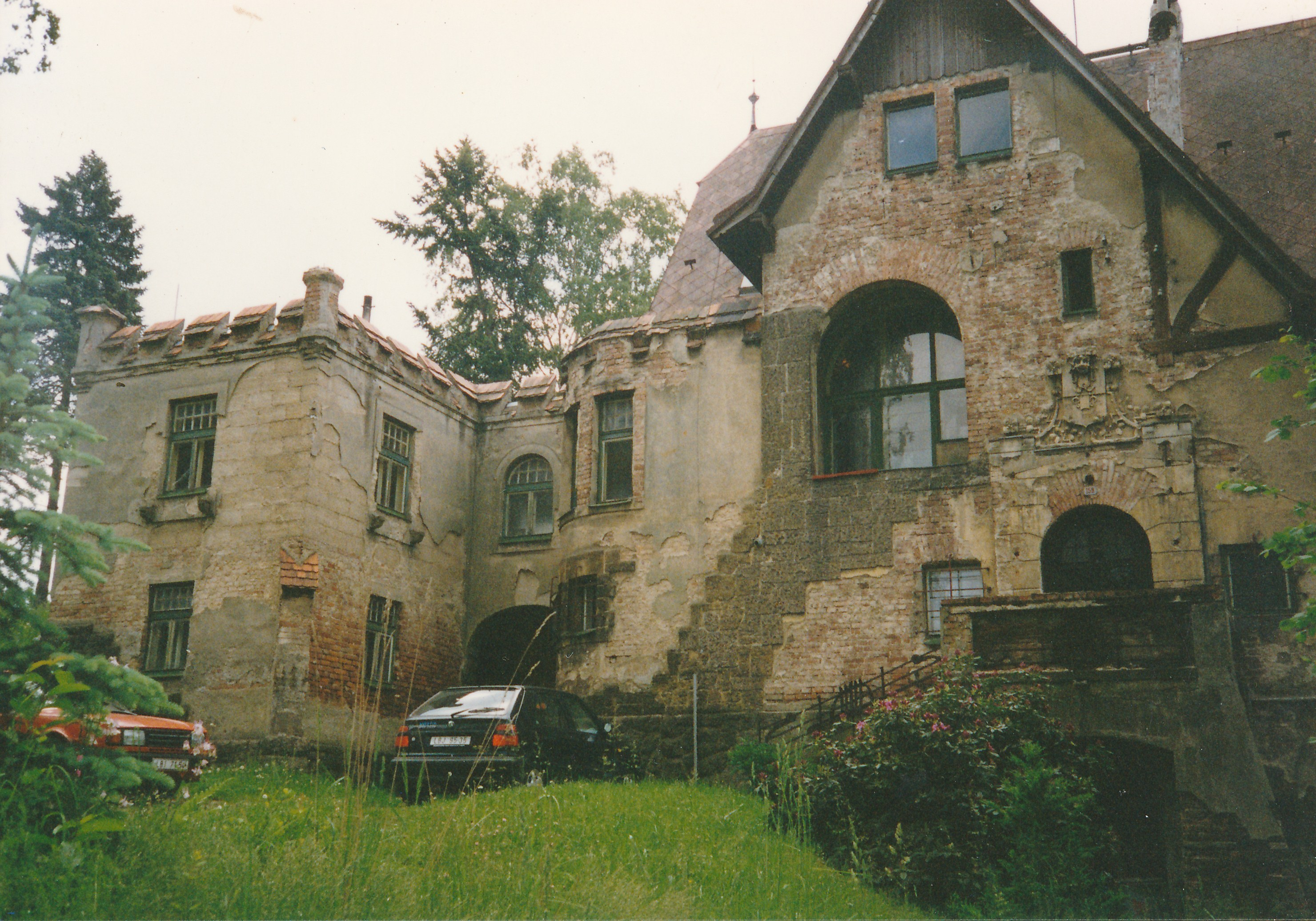 Postavena v roce 1900 v Alt Habendorfu (Stráži nad Nisou). Stav v roce 1993.